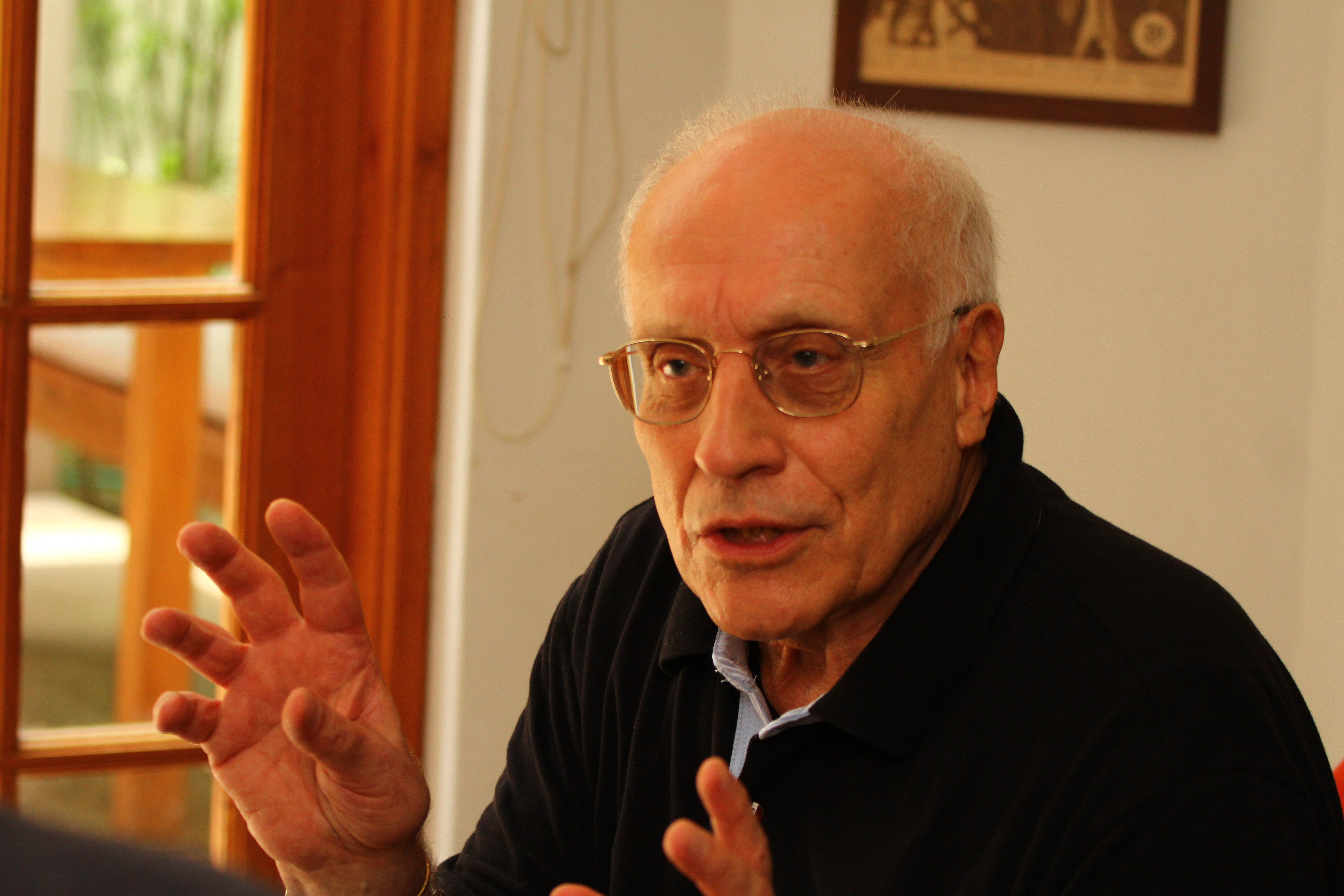 Helmut Daher